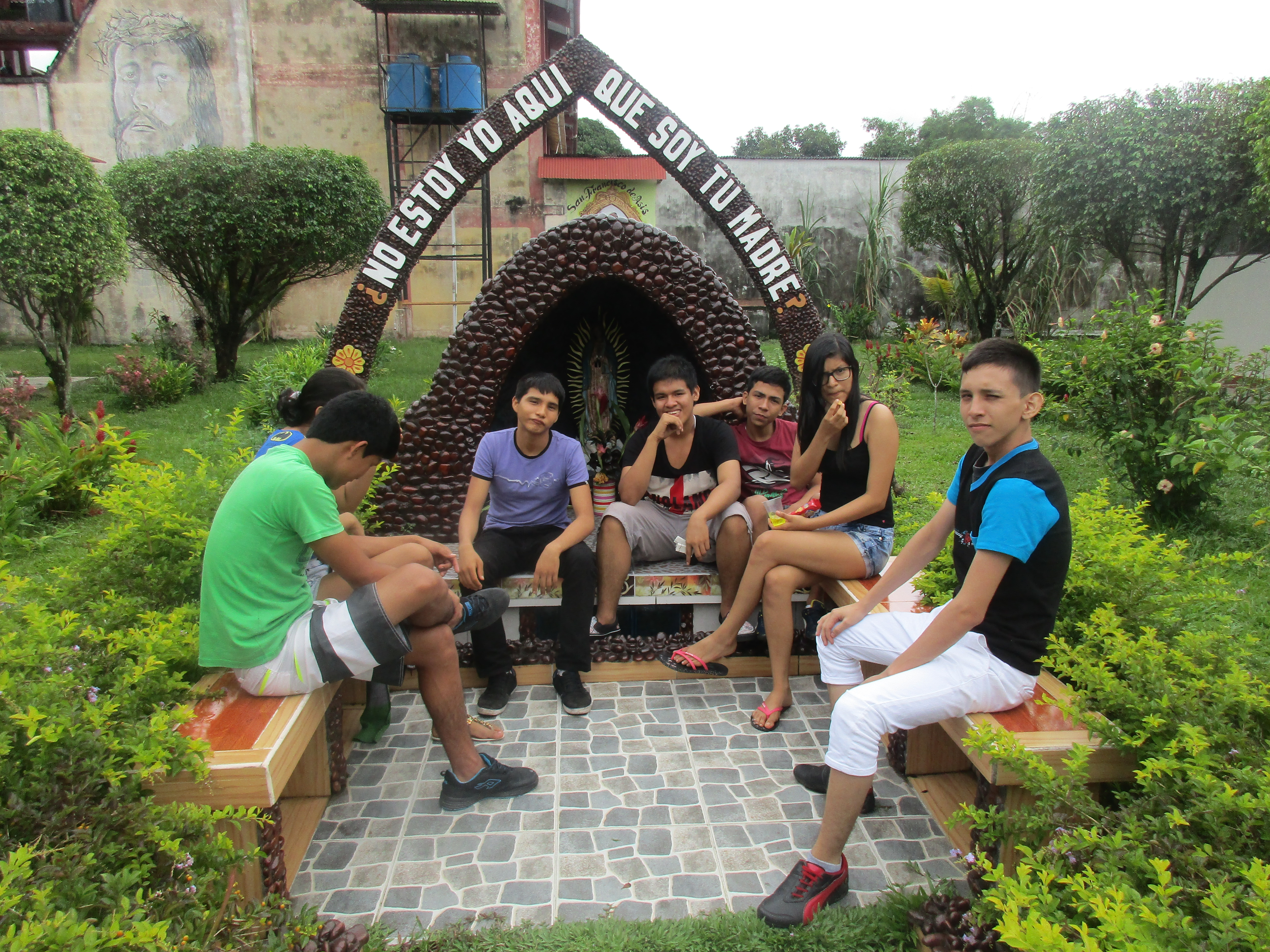 Amigos juveniles